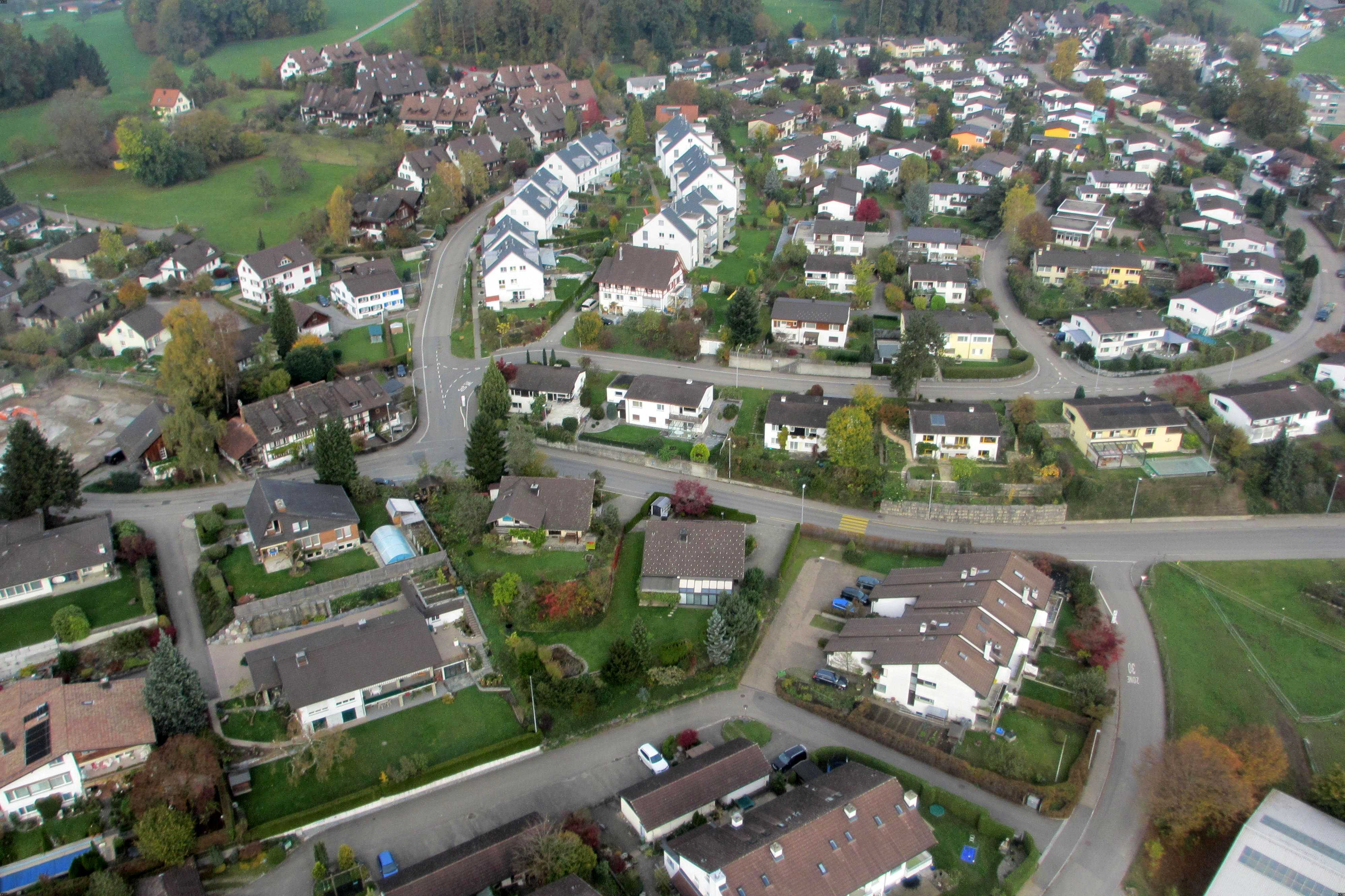 Wolfhausen, Büehlhof, Luftaufnahme